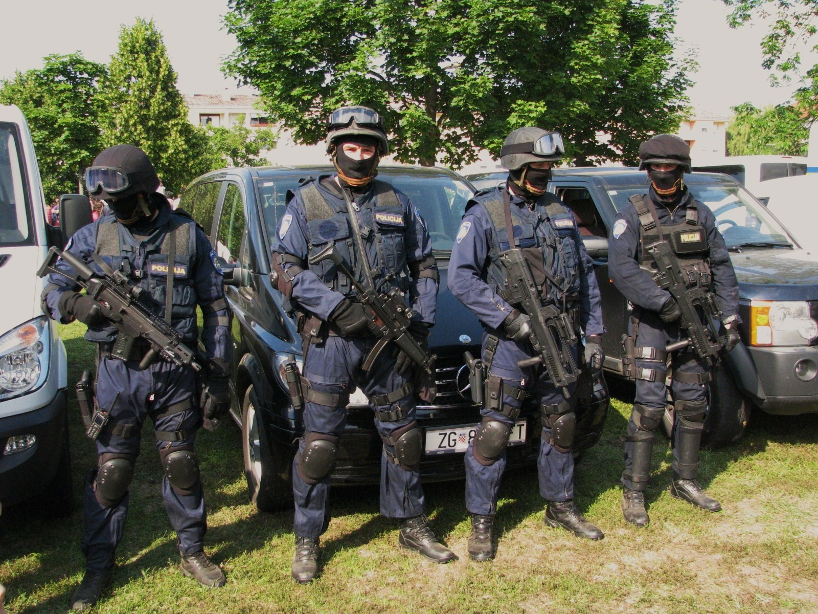 Specijalci MUP RH